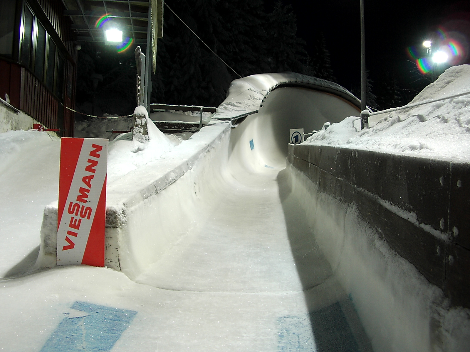 Rennrodelbahn Oberhof - Kurve 7